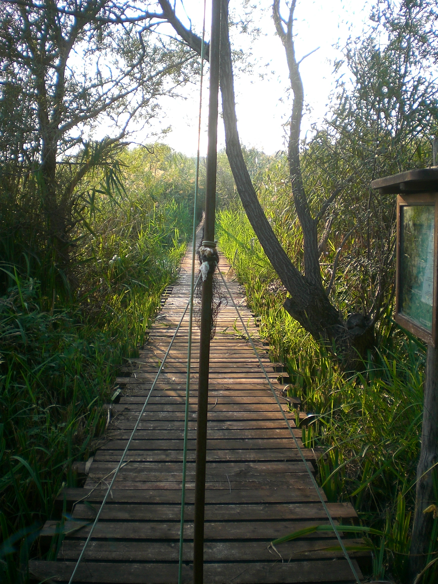 Oasi WWF di Persano This is a photo of a monument which is part of cultural heritage of Italy. The authorisation for taking photos of this object was provided by the World Wide Fund for Nature Italy.